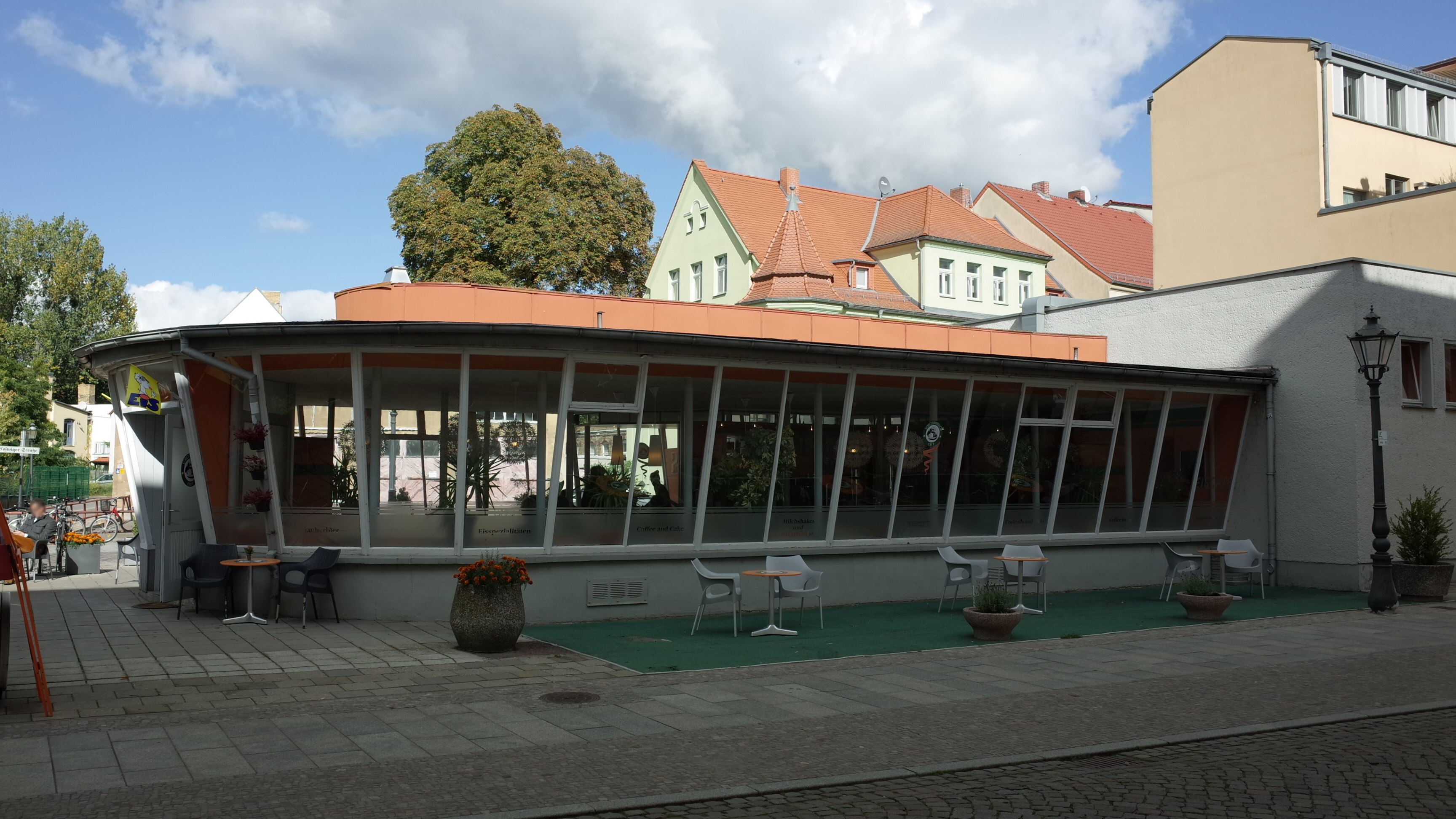 Lutherstadt Wittenberg, Schlossplatz 15, Chemie-Pavillon (Baudenkmal im Denkmalverzeichniss Sachsen-Anhalt, Erfassungsnummer: 094 35862 000 000 000 000 [1])